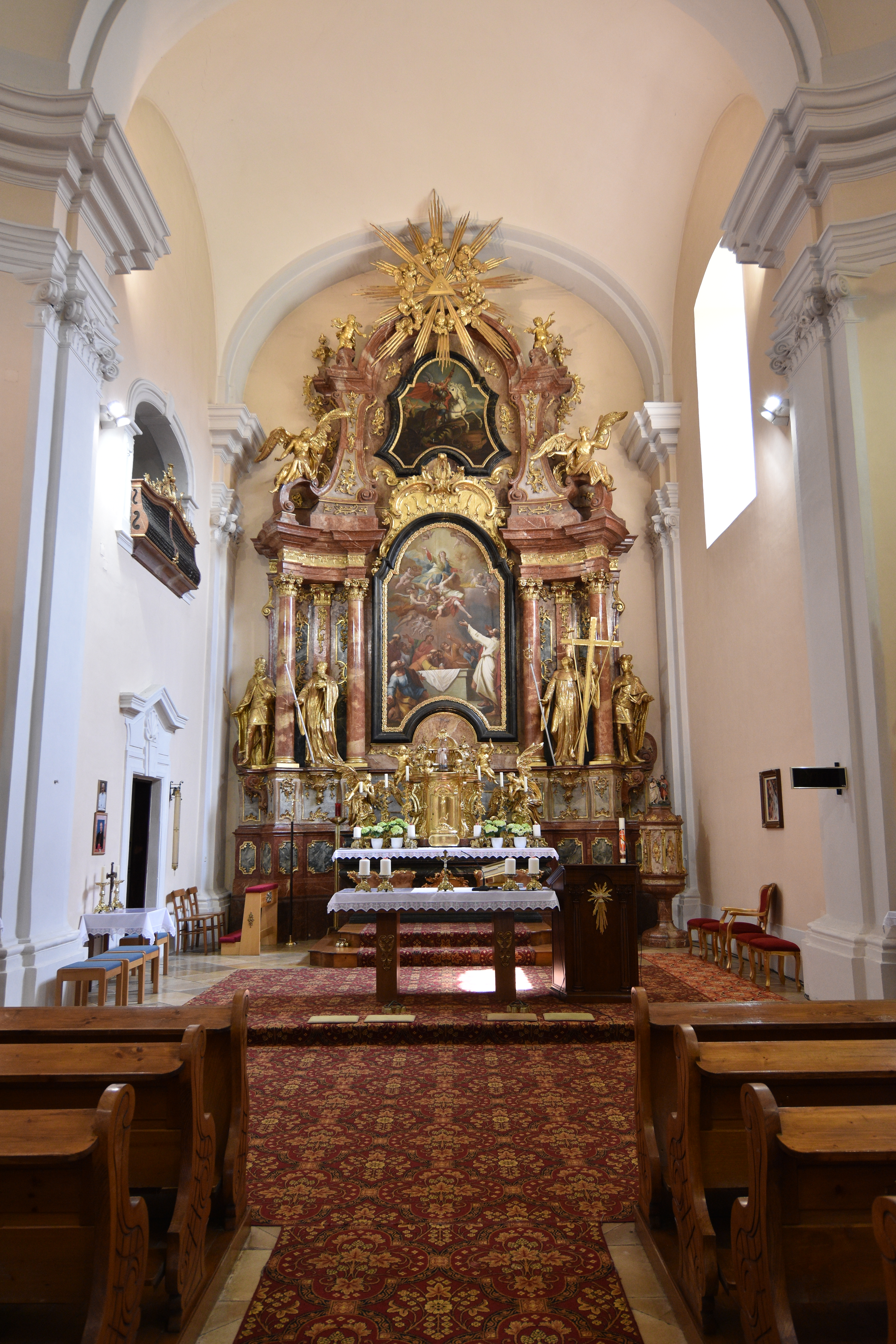 Pfarrkirche hl. Georg und Mariae Himmelfahrt, Klostermarienberg - Interior